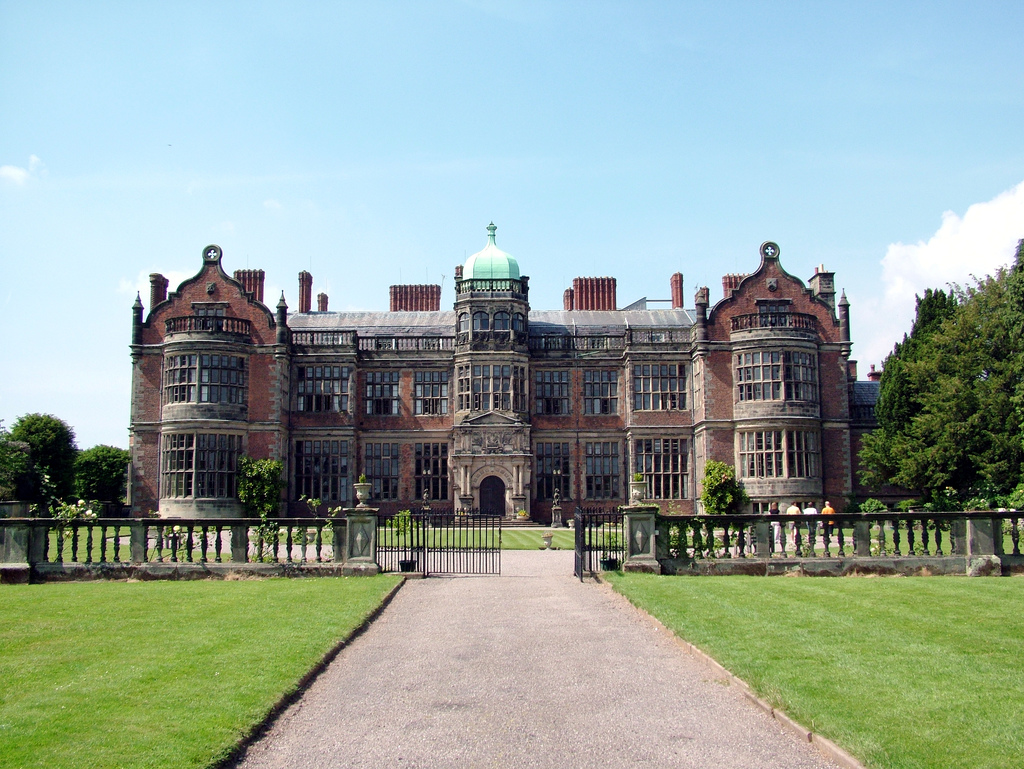 Ingestre Hall June 2007